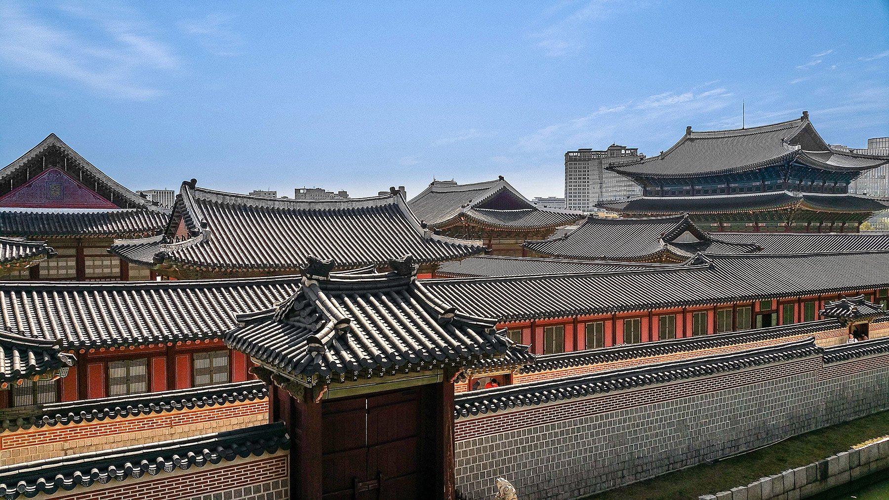 아르다운 경복궁